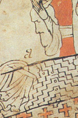 A Pray-kódex egyik illusztrációjának részlete